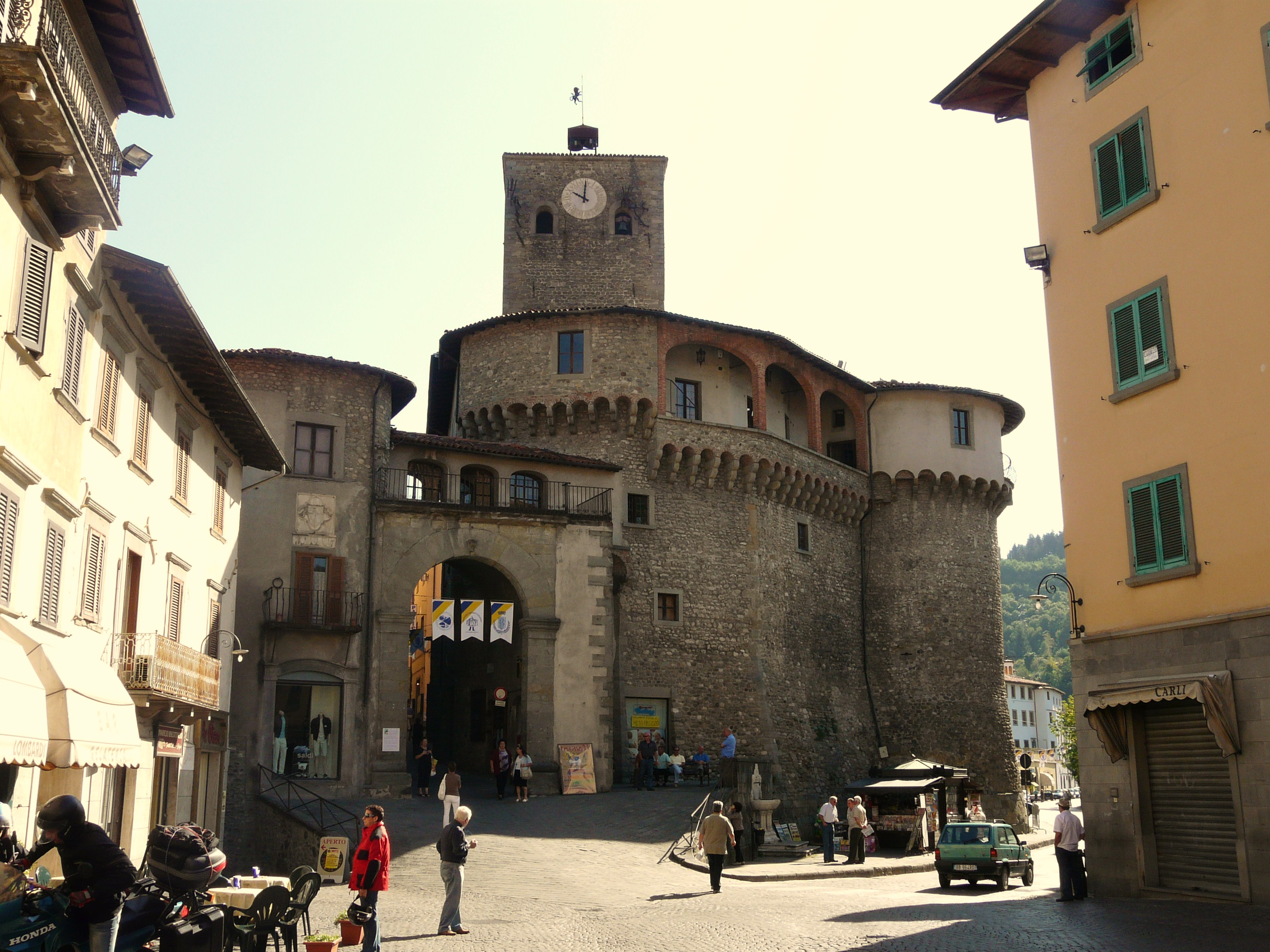 Rocca Ariostesca, Castelnuovo di Garfagnana, Toscana, Italia